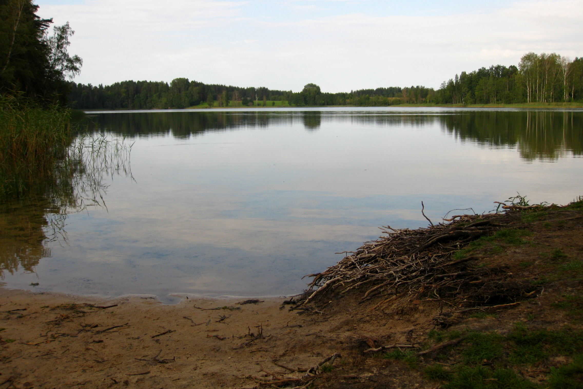 Koorküla Valgjärve põhjakaldal, Koorküla LKA